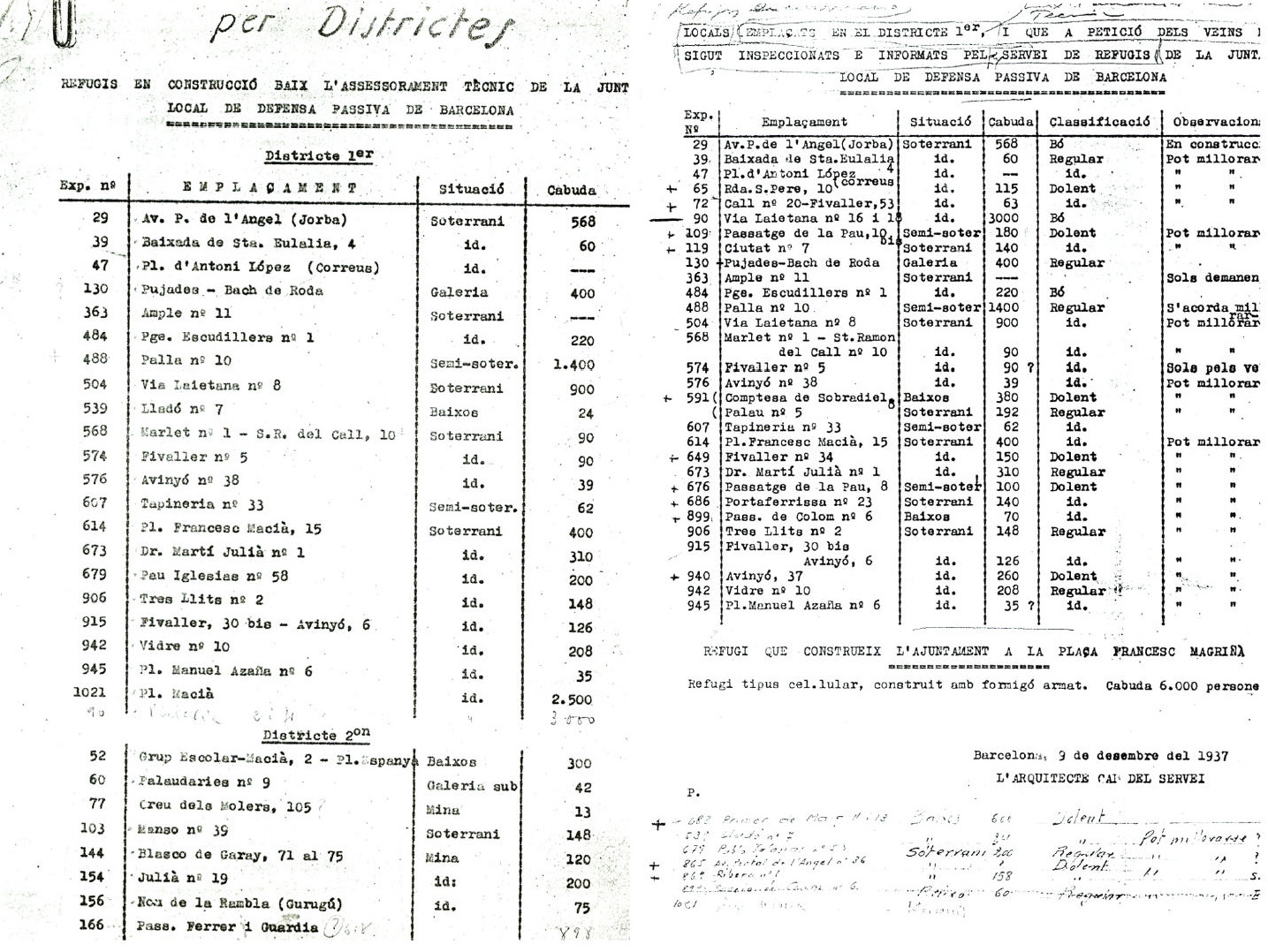 Llistat del 9 desembre 1937 amb els refugis en construcció a Barcelona sota la tutela de la Junta Local de Defensa Passiva de la ciutat.